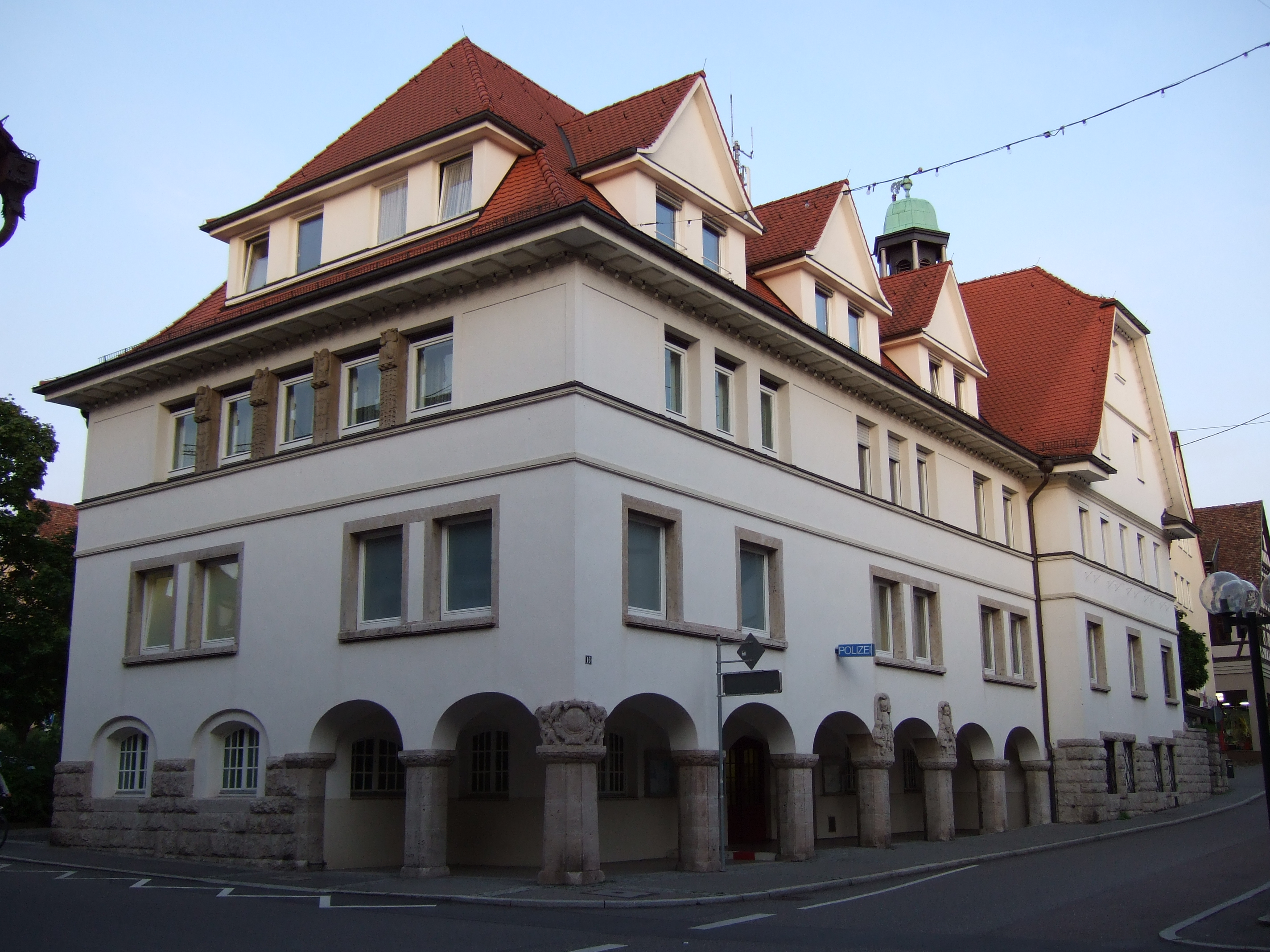 Fellbach - Polizei Altes Rathaus, erbaut um 1600. Jugendstil-Erweiterungsbau 1912.